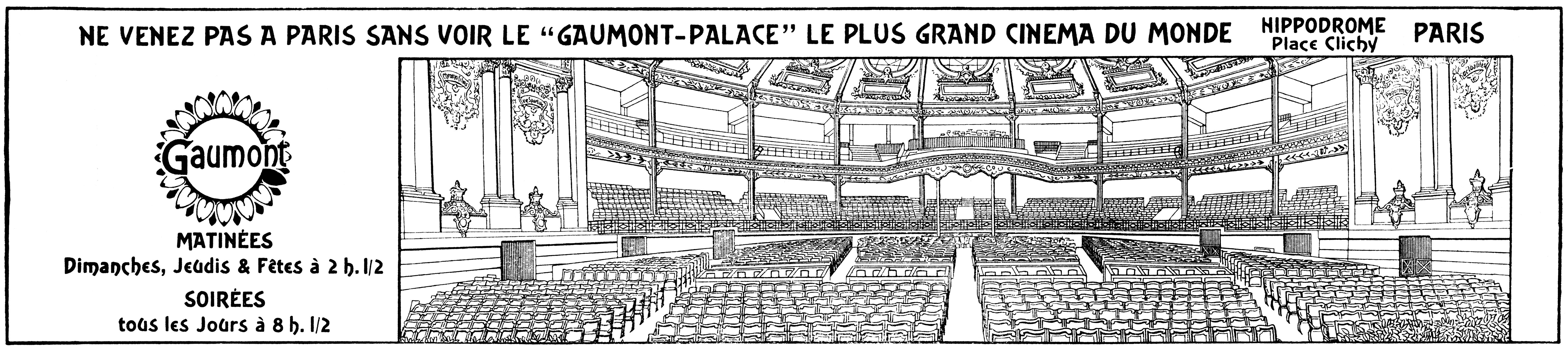 Publicité parue dans le n°3646 du 11 janvier 1913 de l’Illustration pour le Gaumont-Palace. Elle présente un dessin de la seule salle de ce cinéma et donne les horaires de projection.